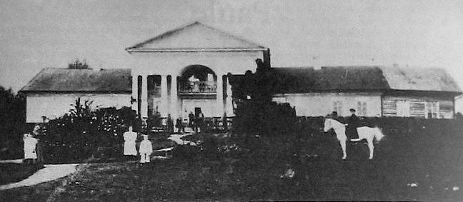 Беларуская (тарашкевіца): Павульле (Pavulle), сядзіба Сяляваў (Sialava)